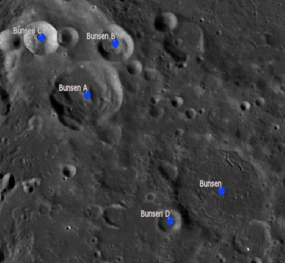 Cráter lunar Bunsen. Cráteres satélite. (Imagen LRO)